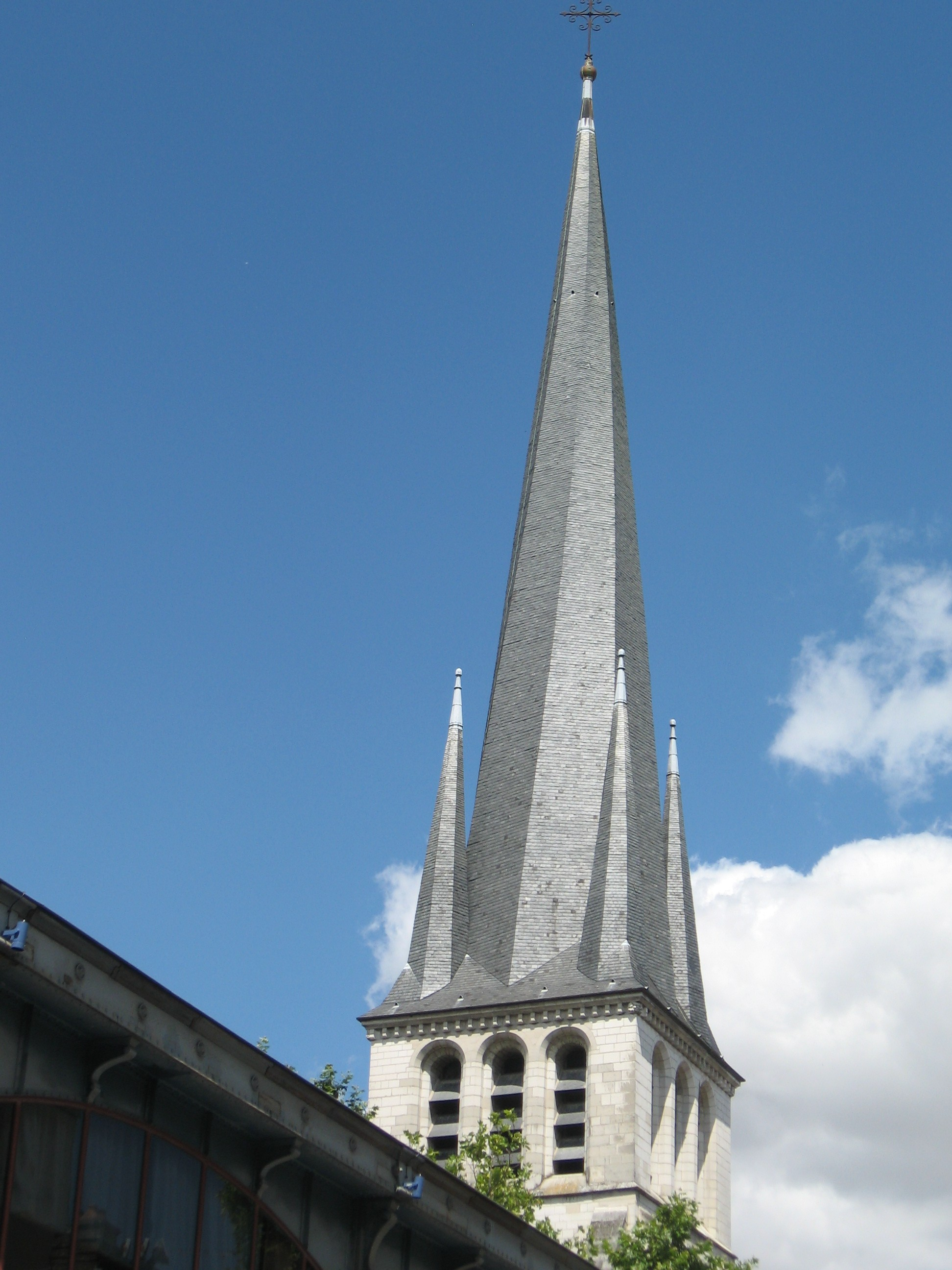 Photographie du clocher de l'église Saint-Rémi de Troyes dans l'Aube